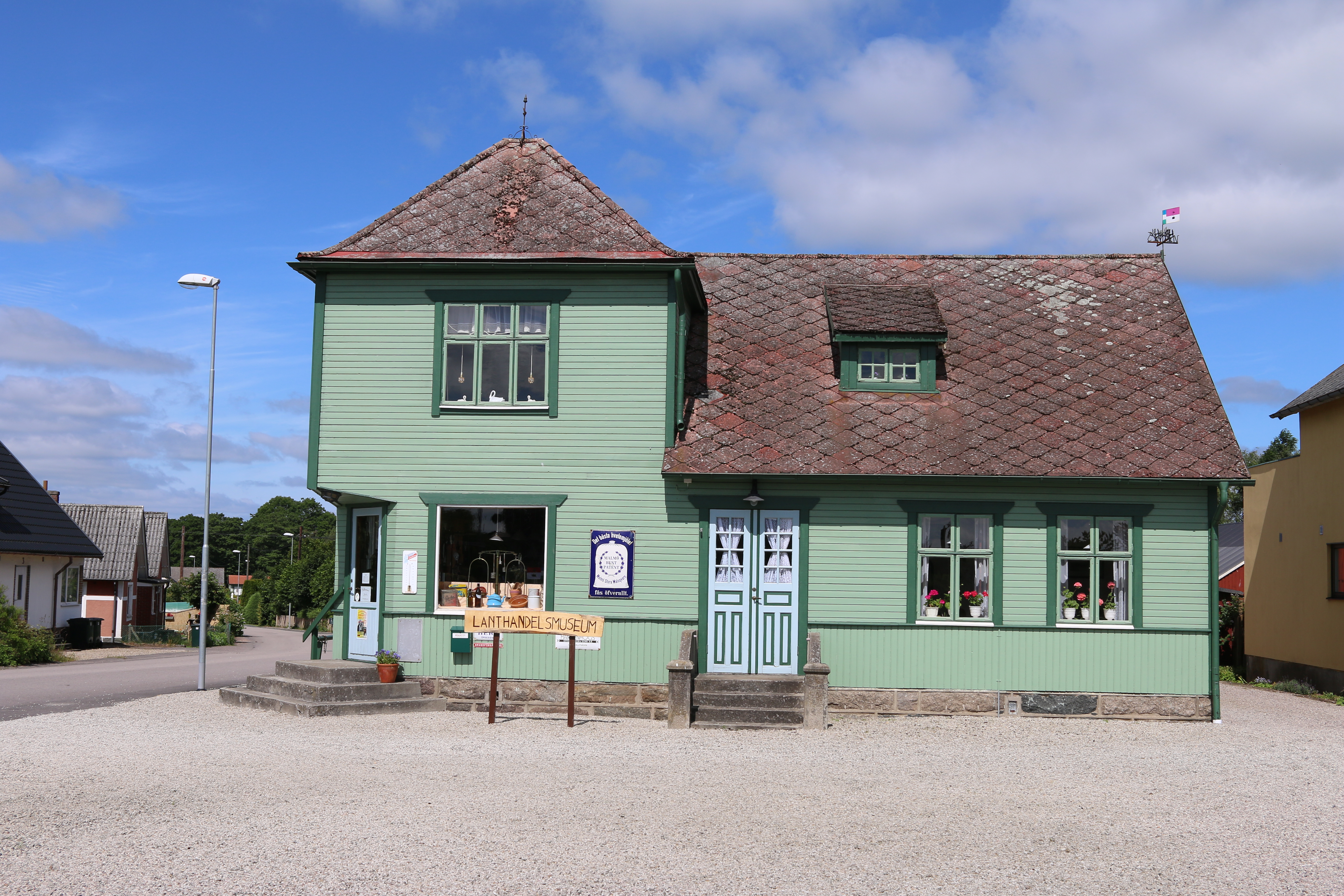 Lanthandelsmuseet i Önneköp